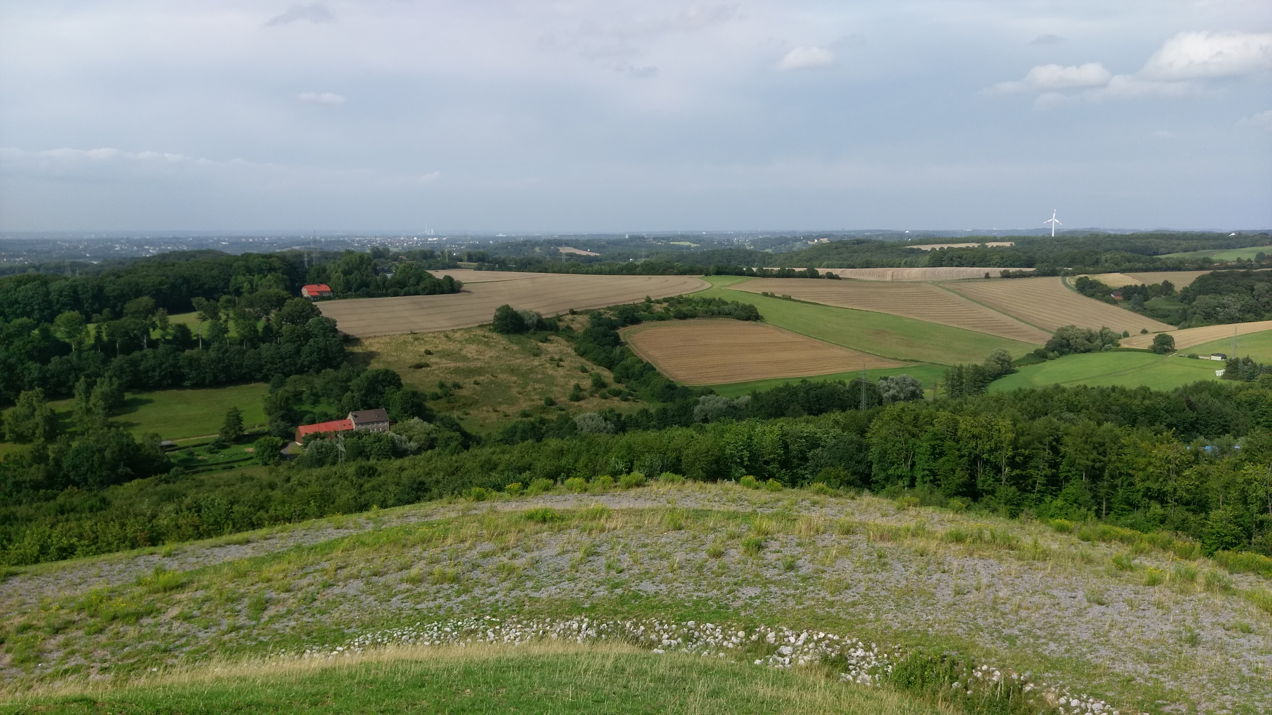 Rottberg Plöger Steinbruch Velbert Ruhrgebiet